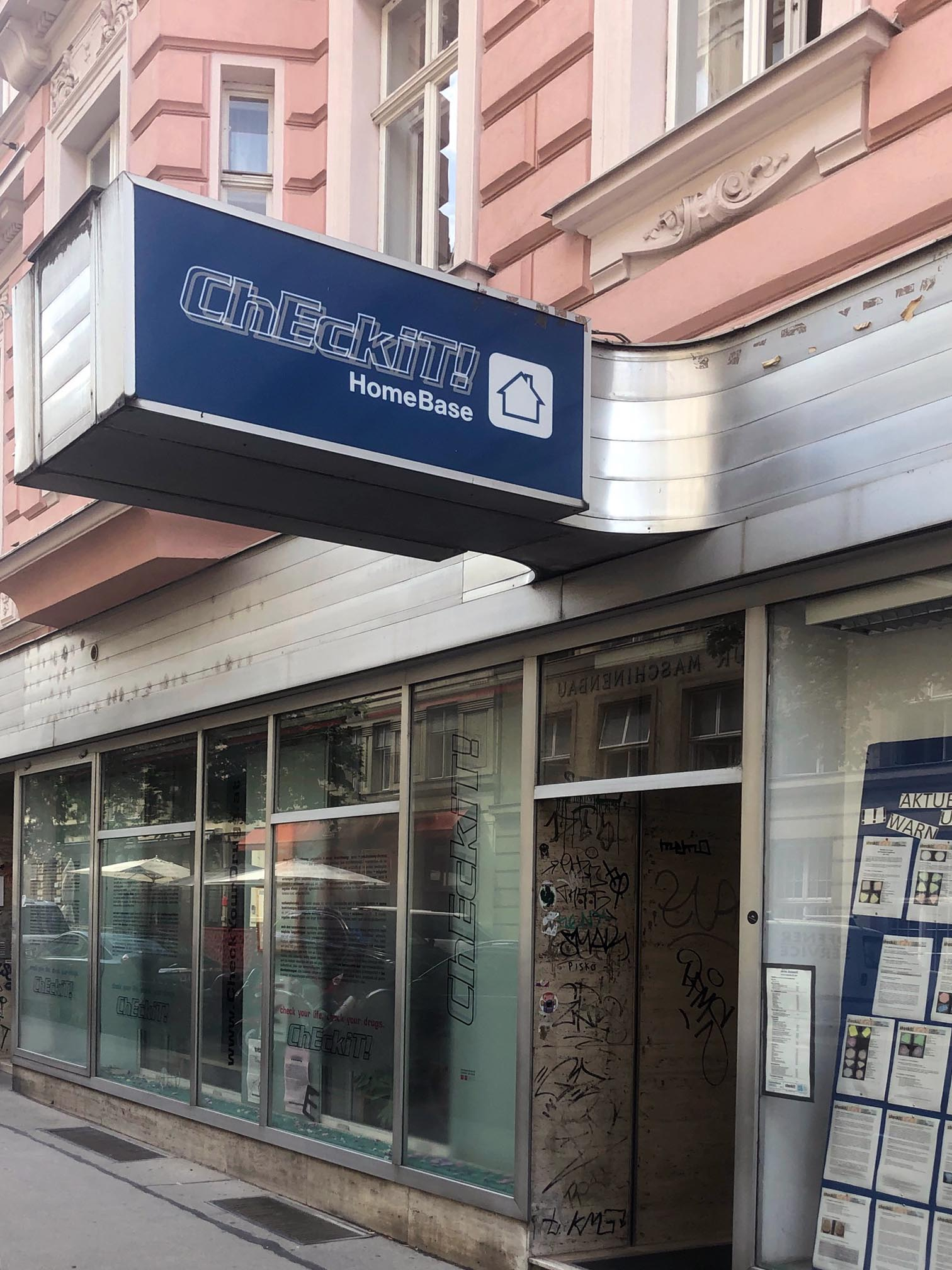 check it Standort Wien